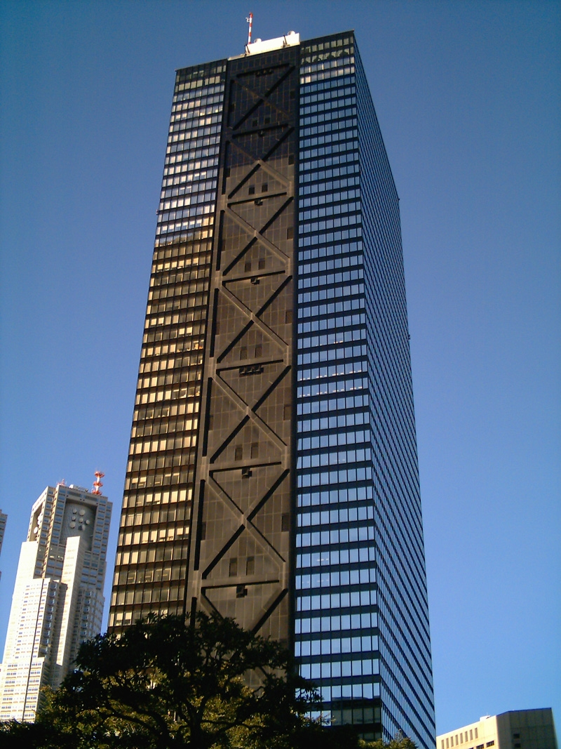 Shinjuku_Mitsui_Building_Tokyo Japan